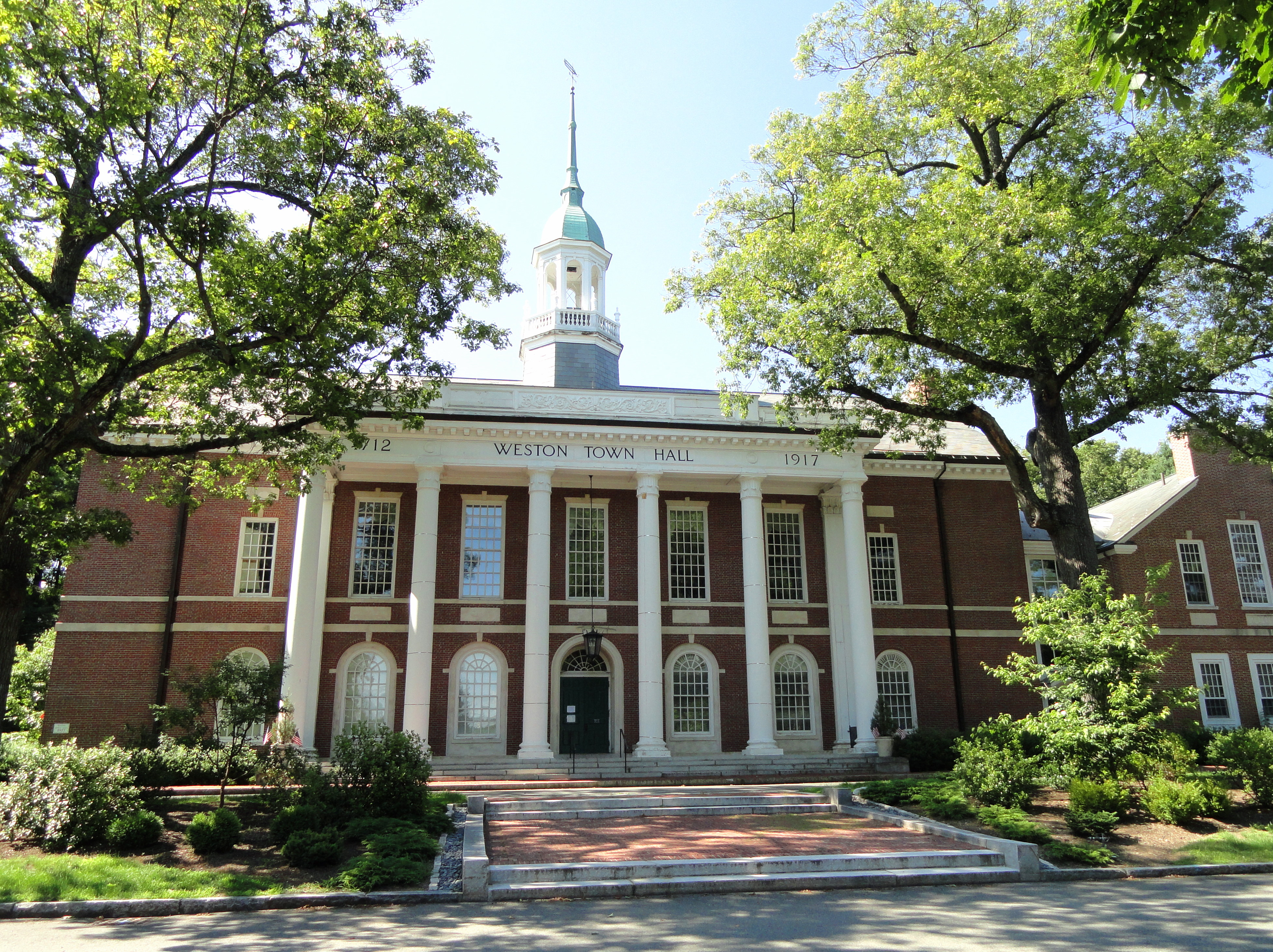 Weston, Massachusetts, USA.